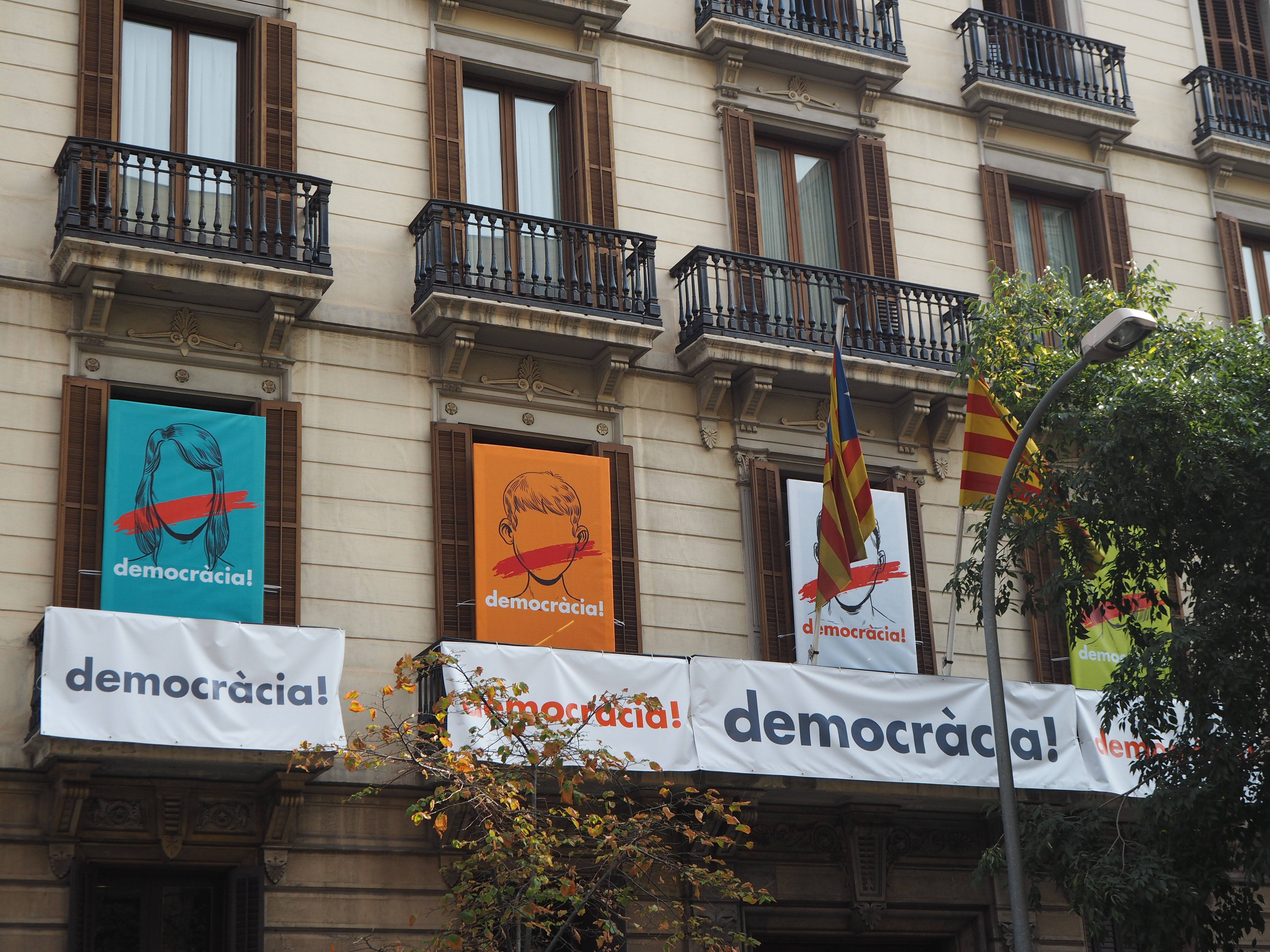 Seu Nacional d'Òmnium Cultural. Carrer Diputació, 276, pral. 08009 Barcelona.